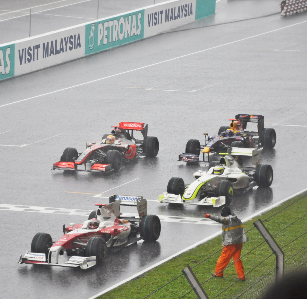 fin de la course de F1 de malaisie 2009